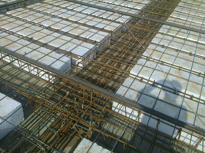 طوبار